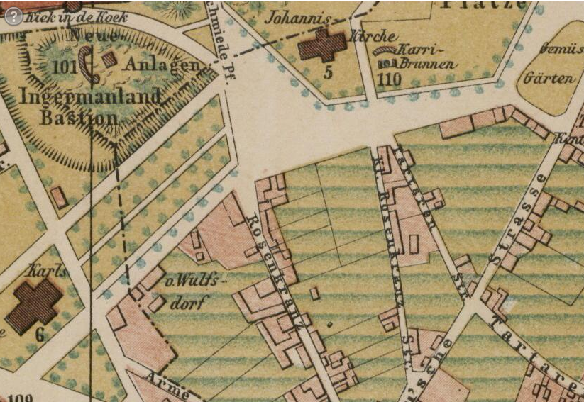 Väljavõte 1889. aasta Tallinna kaardilt, Vabaduse väljaku piirkond.